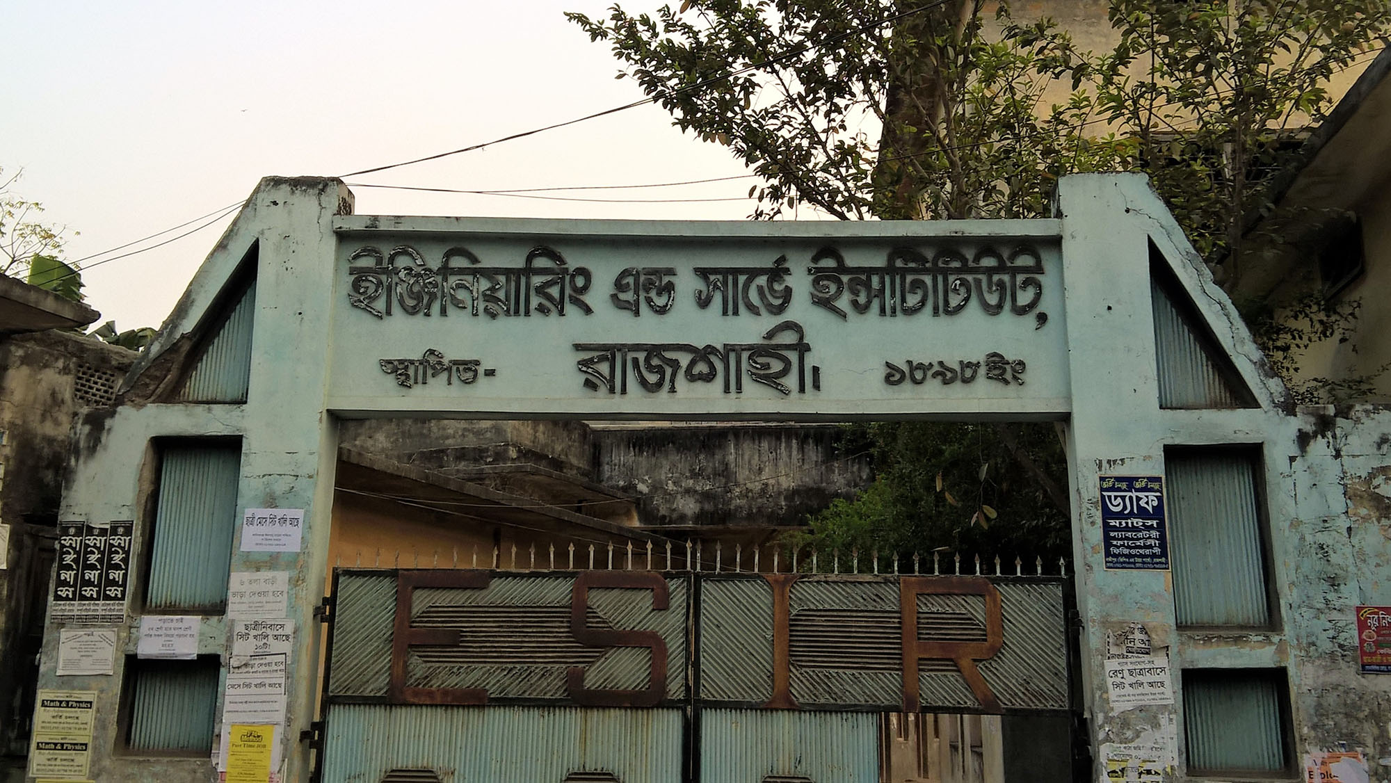 রাজশাহী ইঞ্জিনিয়ারিং অ্যান্ড সার্ভে ইন্সটিটিউট শিক্ষা নগরী রাজশাহী শহরের প্রান কেন্দ্র সাহেব বাজার সংলগ্ন সোনাদীঘির পশ্চিমে ১৮৯৮ সালেপ্রতিষ্ঠিত হয় । অত্র প্রতিষ্ঠানটি জেলা পরিষদ, রাজশাহী কর্তৃক পরিচালিত।